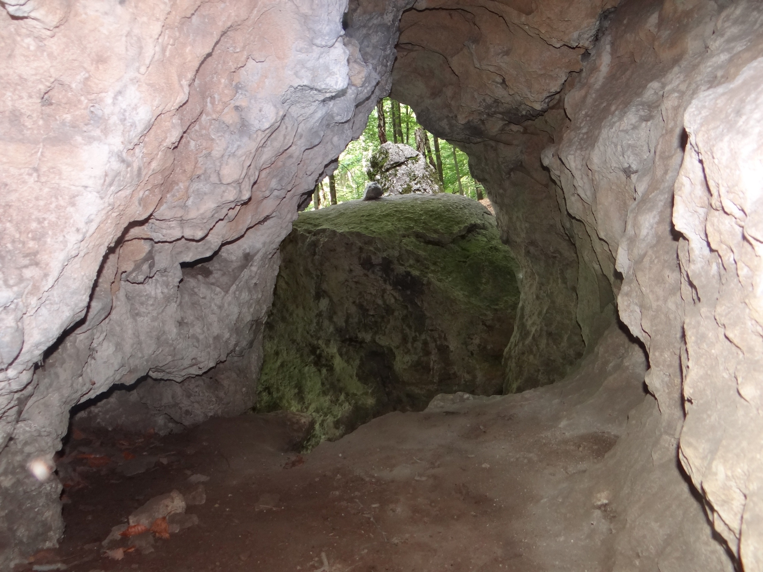 Jaskinia w Kruczej Skale. Lokalizacja: Polska, Wyżyna Częstochowska, Skały Kroczyckie, wzgórze Łysak, skała Wysokie Okapy